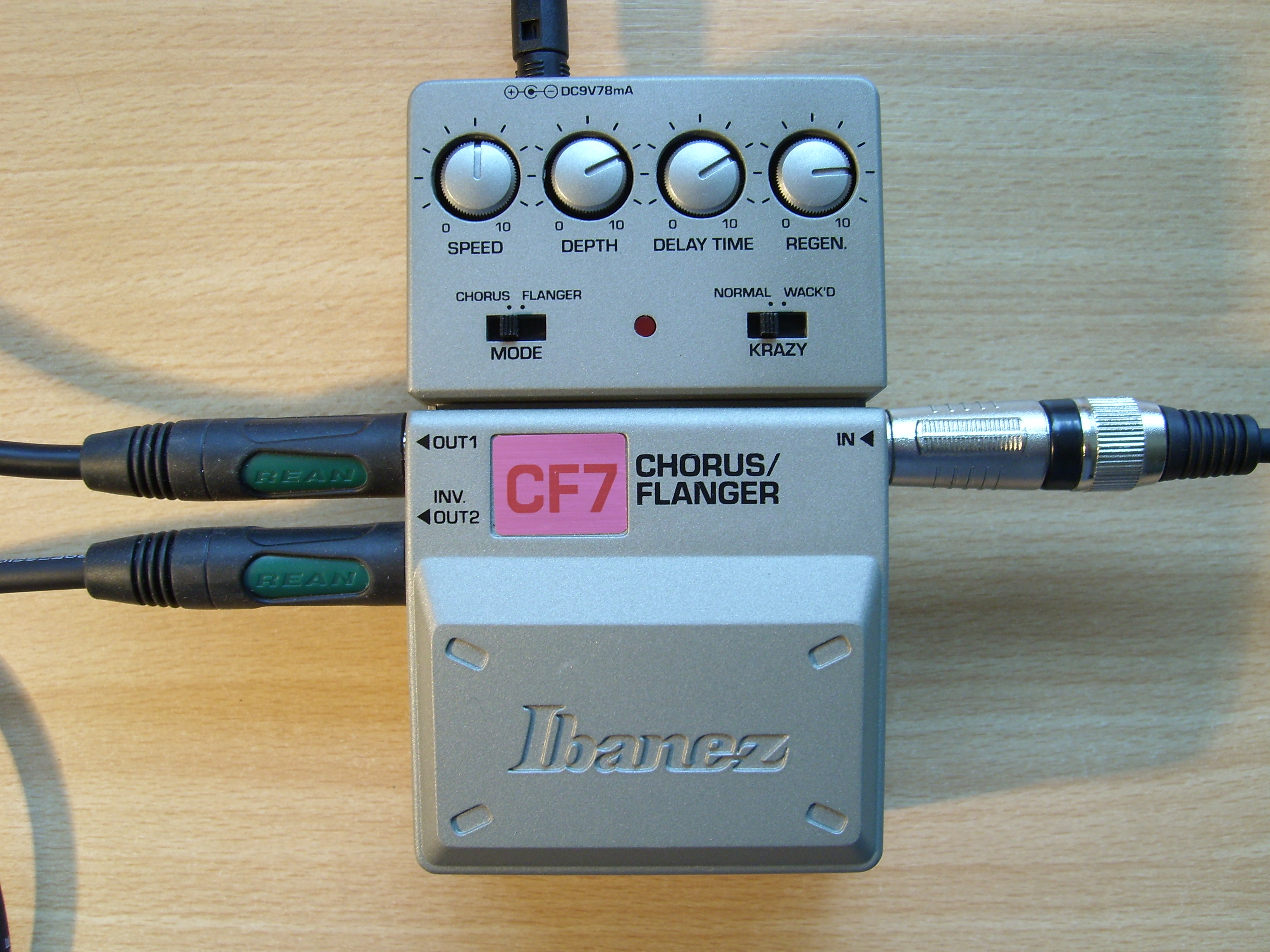 Gitarren-Bodeneffektgerät Ibanez CF7 (guitar effect Ibanez CF7)